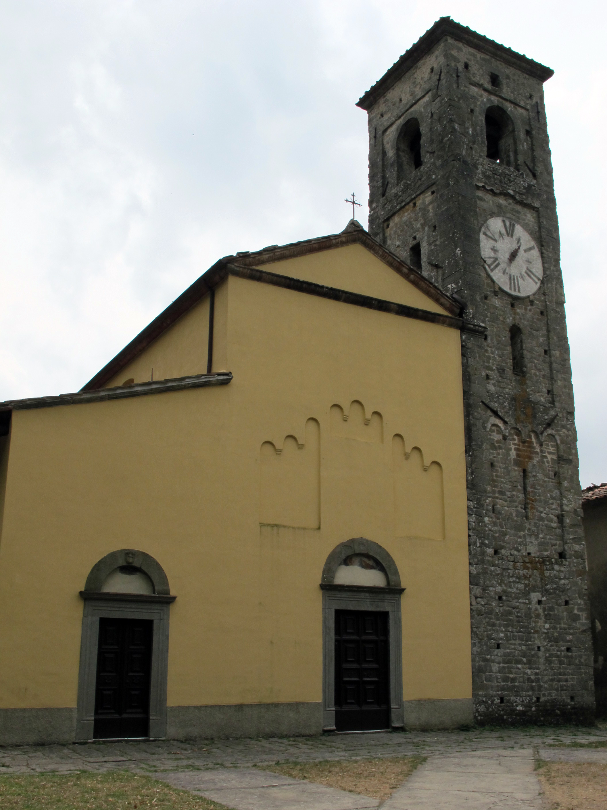 Pescaglia, SS. Pietro e Paolo apostoli